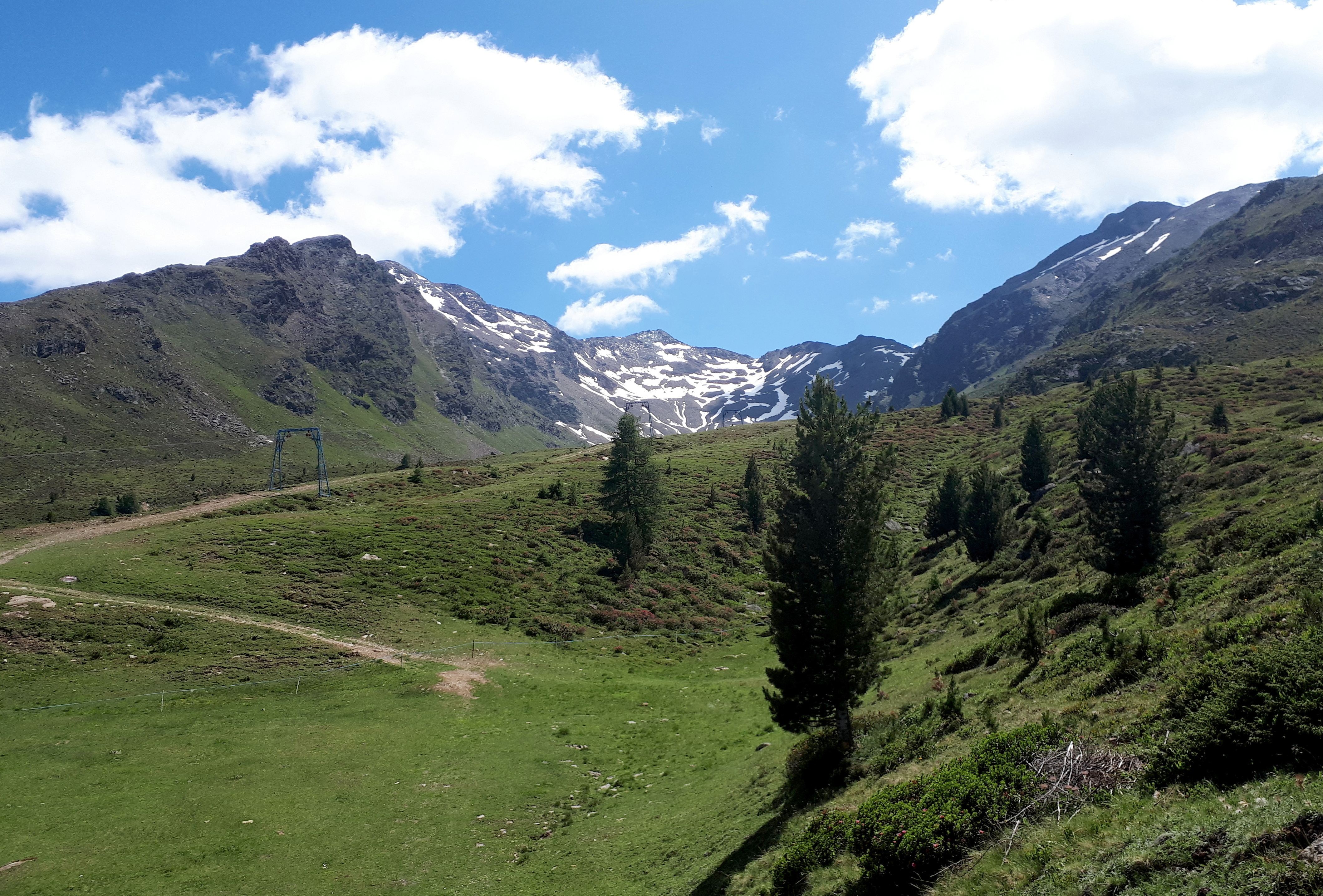 Blick von der Bergstation Maseben zur Valbenairspitze (links) und zur Tiergartenspitze (rechts)